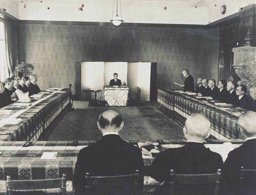 枢密院会議写真。1946年（昭和21年）10月29日、帝国議会において修正を加えた帝国憲法改正案を可決した枢密院会議の写真。